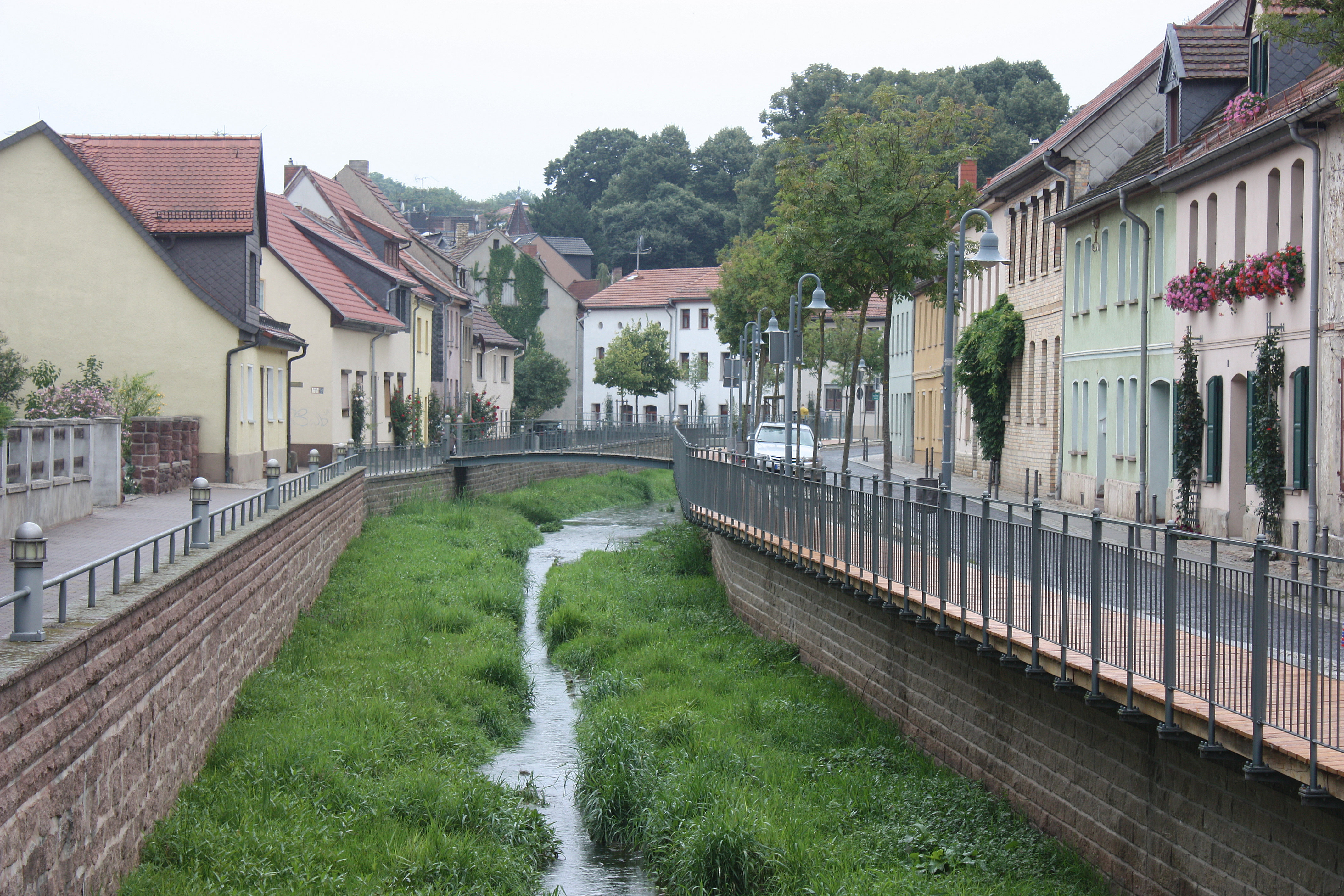 Sangerhausen, An der Gonna This is a photograph of an architectural monument. 80933